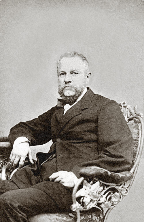 Josef Emanuel Schnirch, český inženýr a projektant